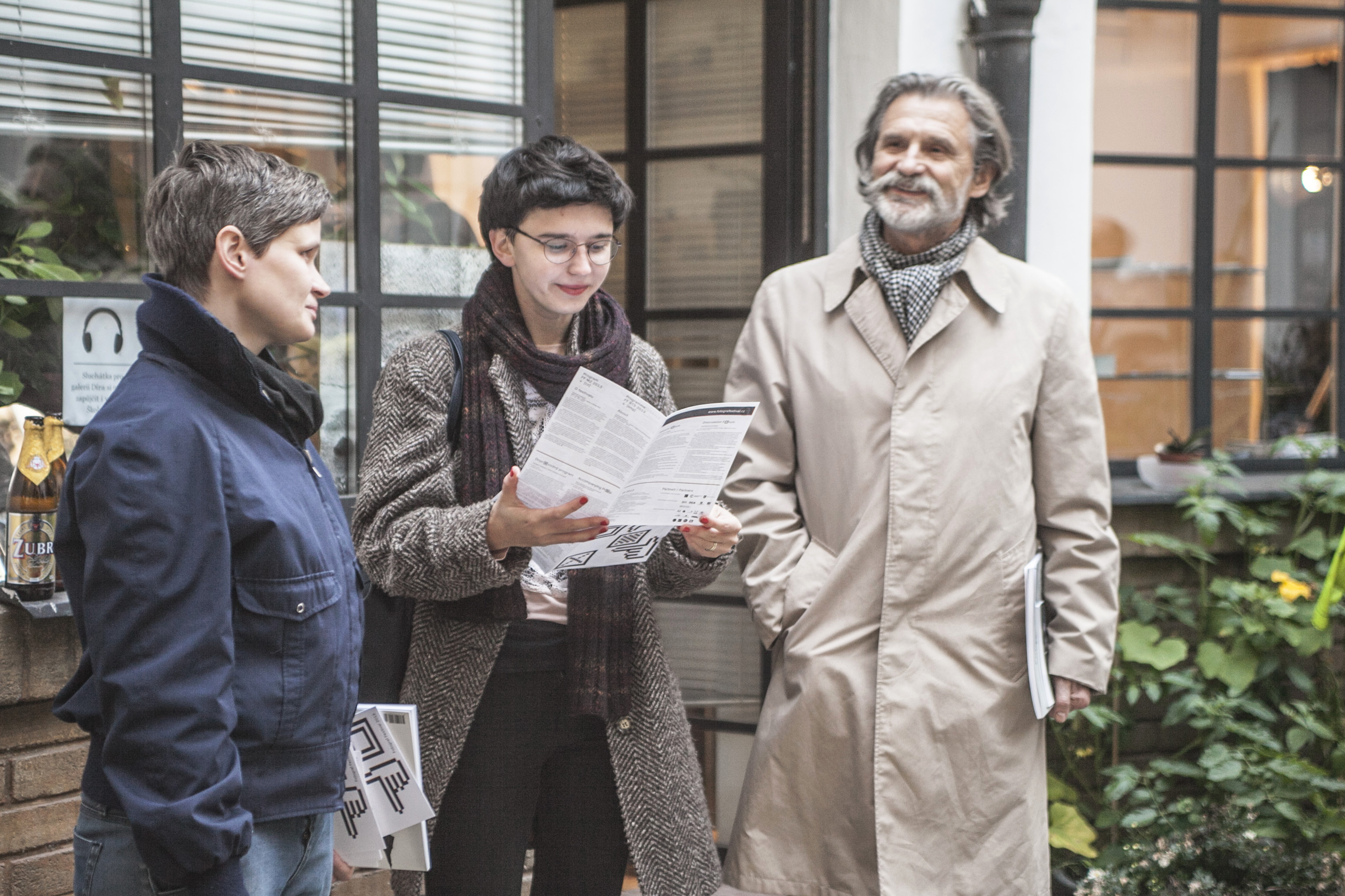 Markéta Kinterová, Hana Buddeus a Pavel Baňka zahajují Fotograf Festival 2013 Mezi znaky na dvoře Školské 28 sdílené Fotograf Gallery a Komunikačním prostorem Školská 28.